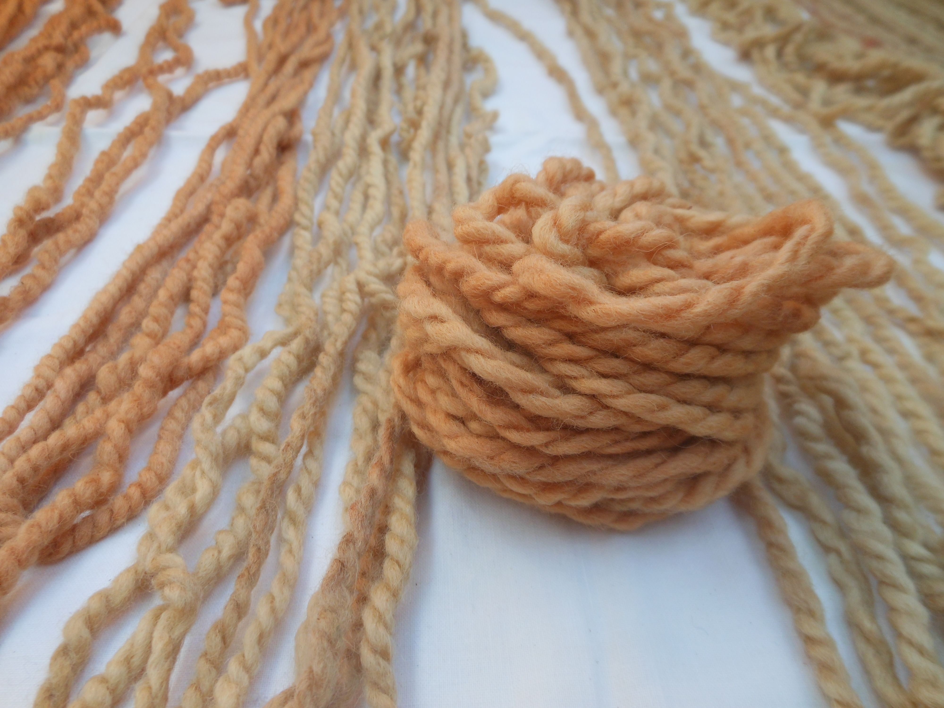 Lana teñida con tintes naturales. Para su teñido se deben recolectar plantas patagónicas. La lana cruda previamente lavada con jabón, se debe colocar en agua con sal para que el tinte se adhiera a ella. En una olla con agua introducir la planta autóctona, dejar hervir por 45 minutos y luego retirarla e introducir la lana previamente hilada. Esta se teñirá del color que desprenda la parte de la planta utilizada.